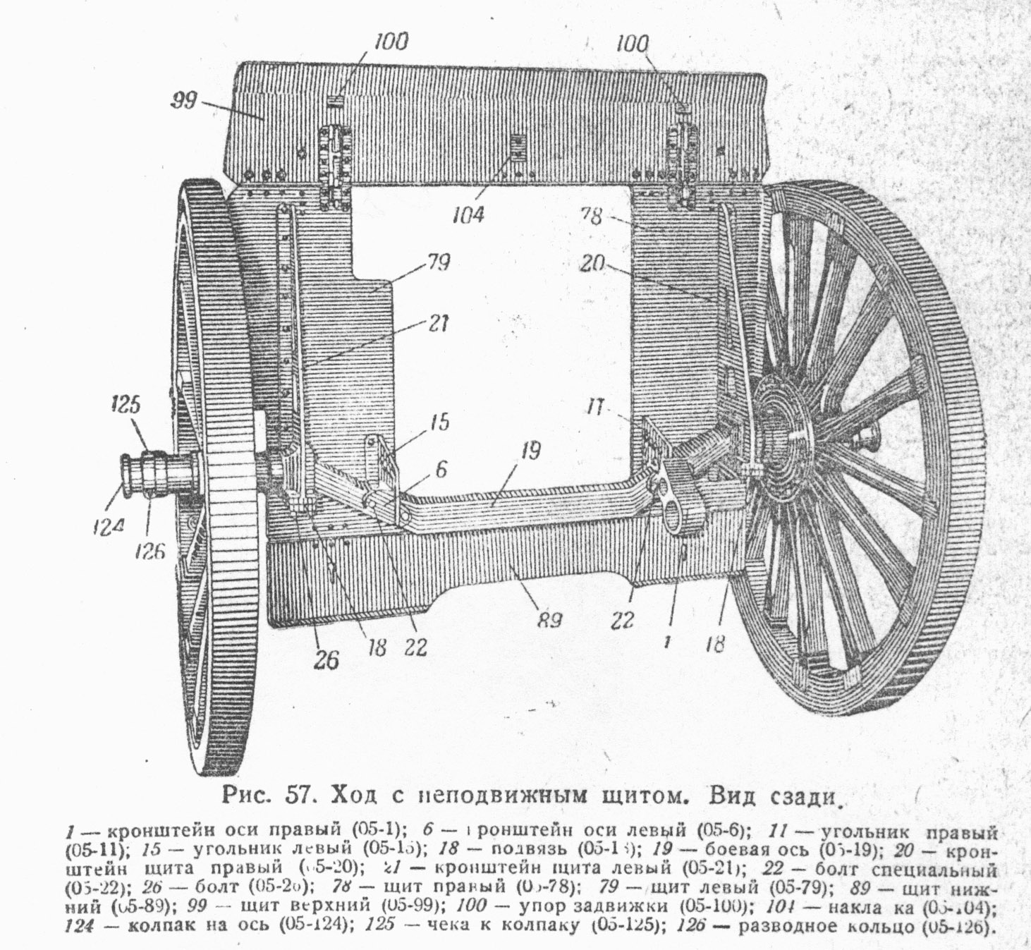 Щит и колесный ход 76-мм дивизионной пушки обр.1902/30 г.